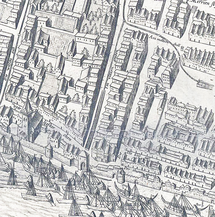 Ausschnitt des Mercator - Stadtplanes, Bereich Filzengraben untere Gabelung des Duffesbach zur Tränke Heumarkt und Rheinufer, Köln